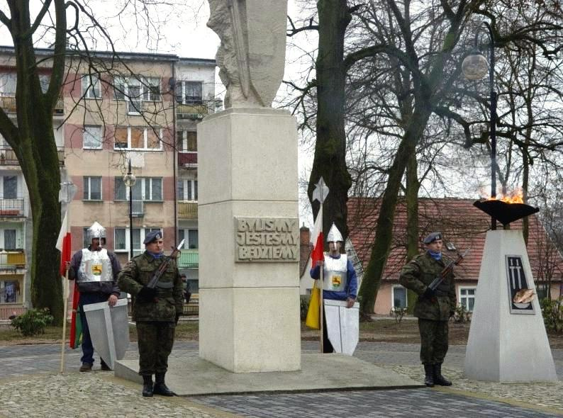 Rocznica wyzwolenia Łobza 03.03.2009